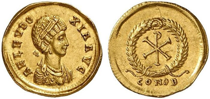 Semisse da imperatriz Élia Eudóxia